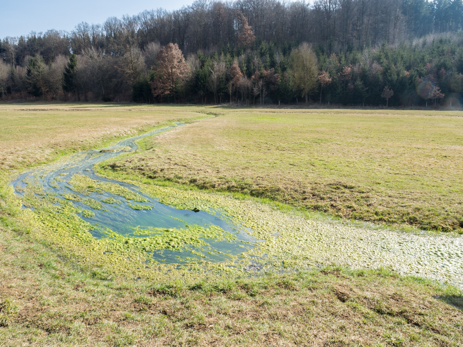 Der Hungerbrunnen bei Gerstetten ist eine sogenannte episodische Karstquelle und führt nur in unregelmäßigen Abständen von meist mehreren Jahren Wasser (LSG:BW-4.25.101)_Hungerbrunnental